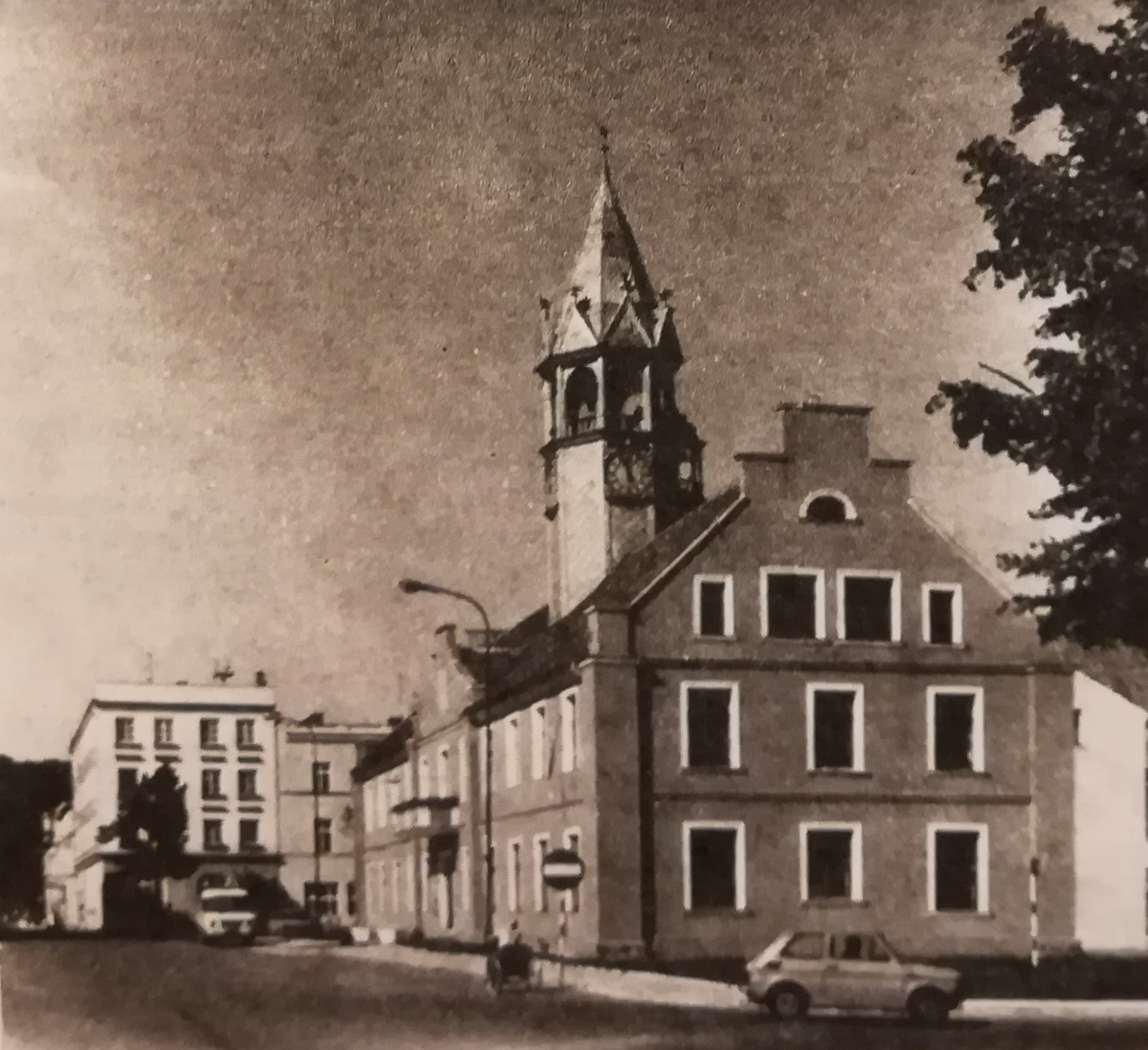 Barczewo w 1988r.